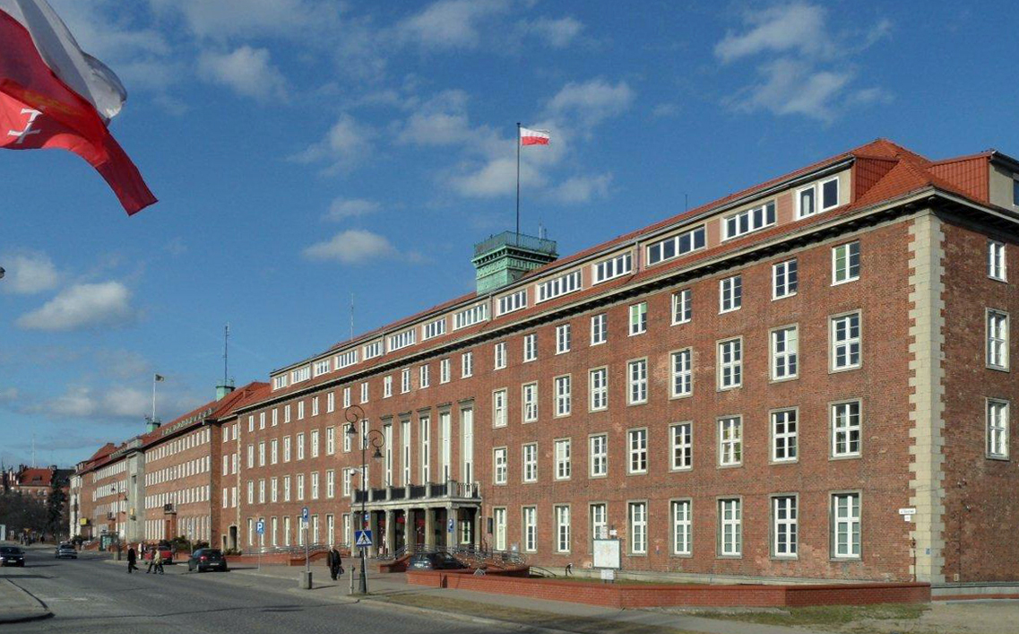 Urząd Marszałkowski woj. pomorskiego i Pomorski Urząd Wojewódzki.